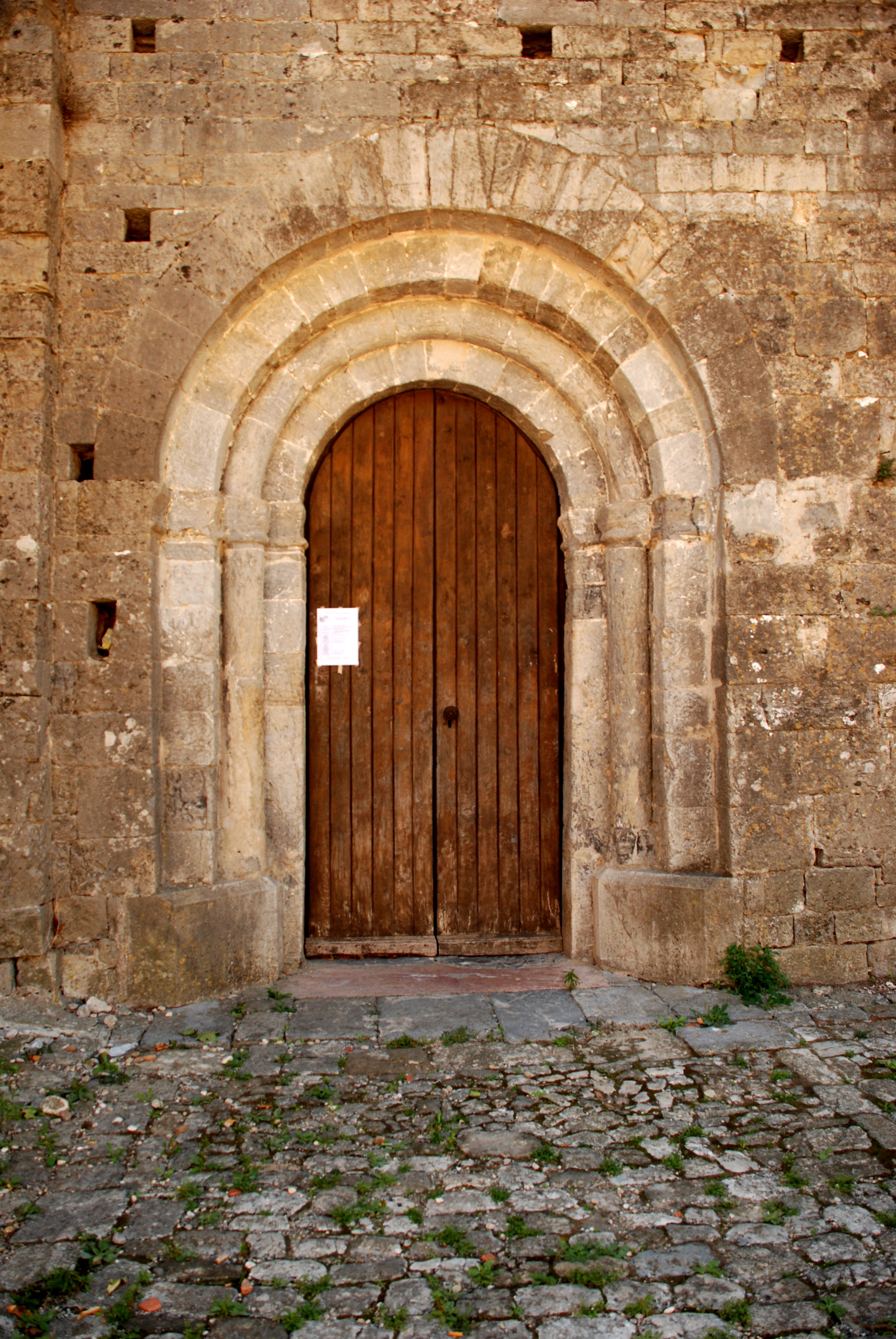 France - Hérault - Église de Saint-Jean-de-Buèges